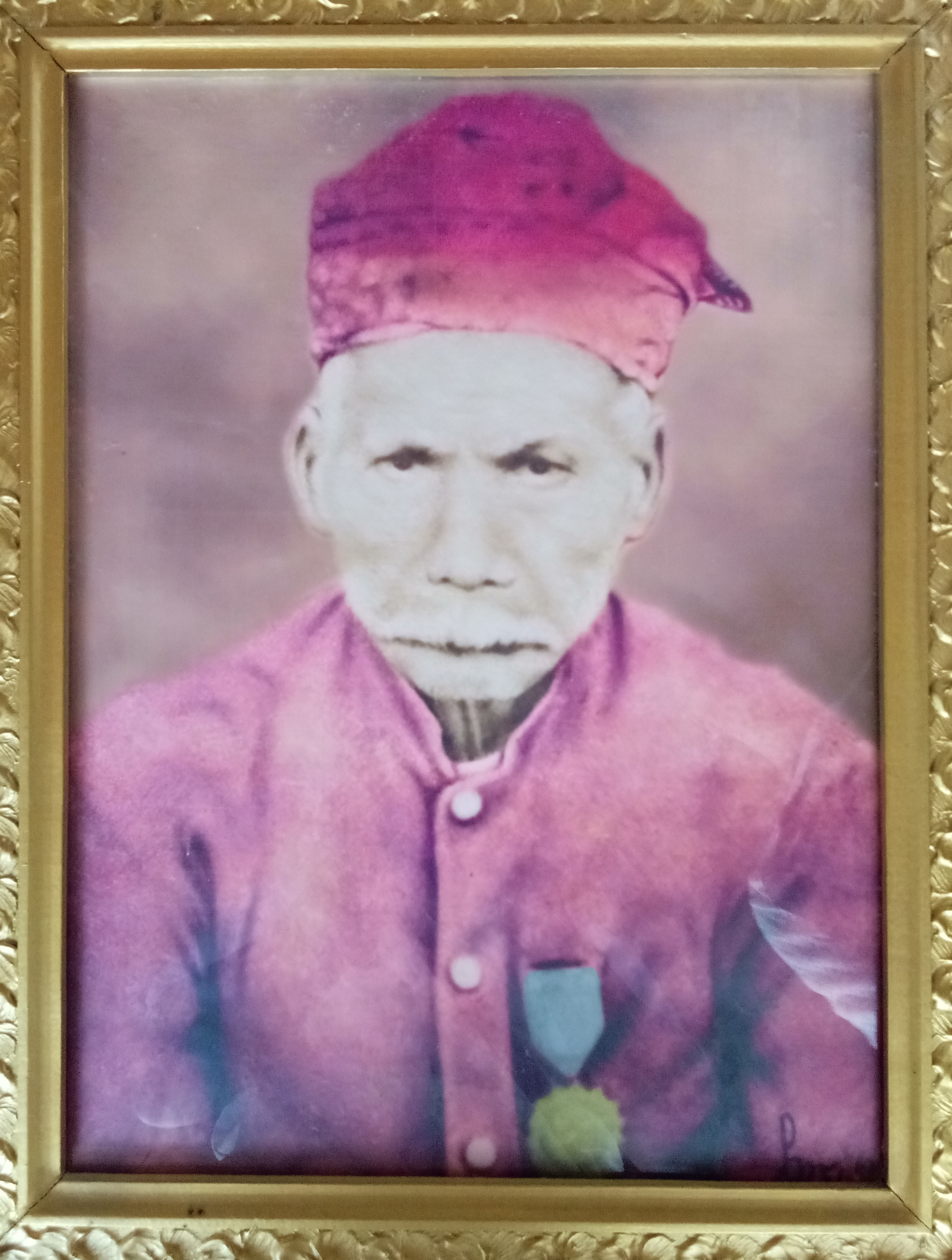 Dokumen Keluarga Ngabe Soekah